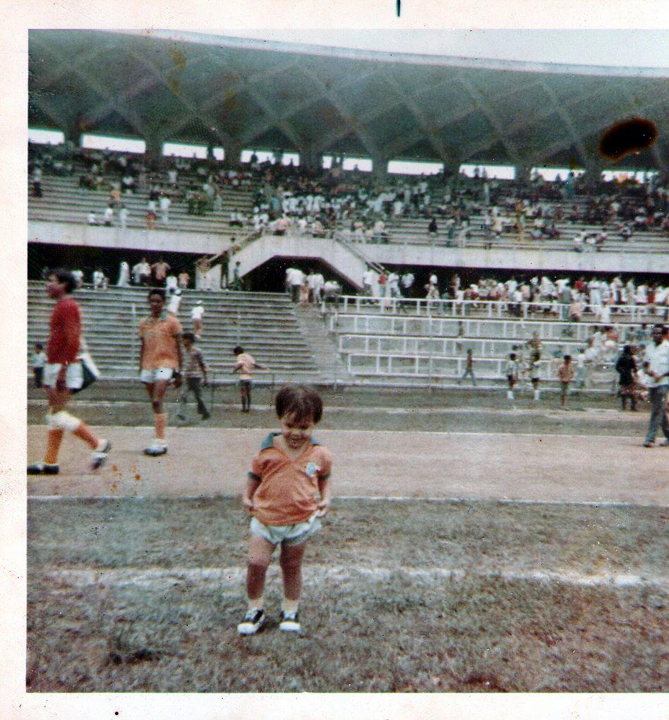 Imagén estadio de futbol